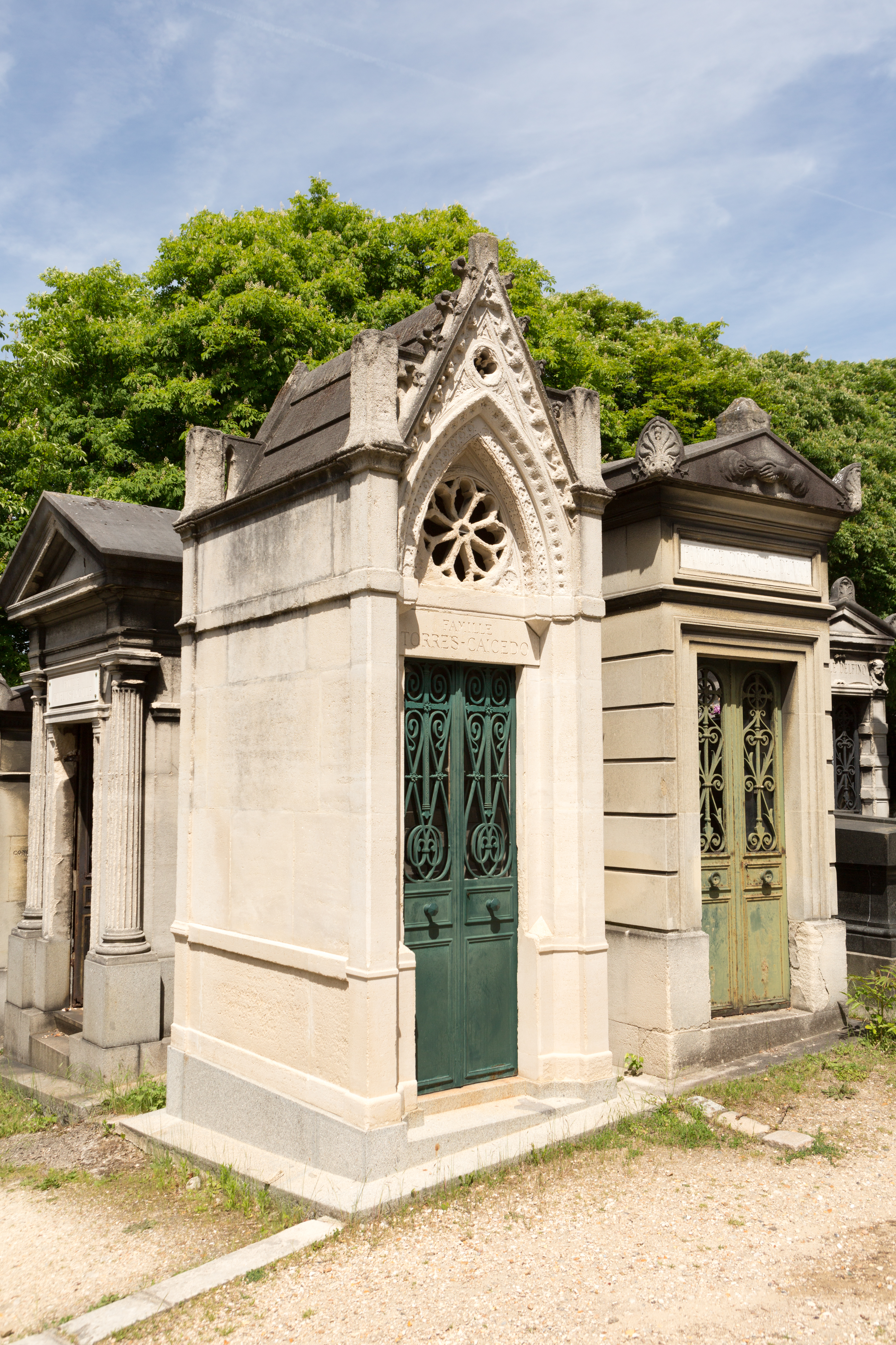 Sépulture de José María Torres Caicedo (1830-1889), intellectuel et un écrivain colombien.